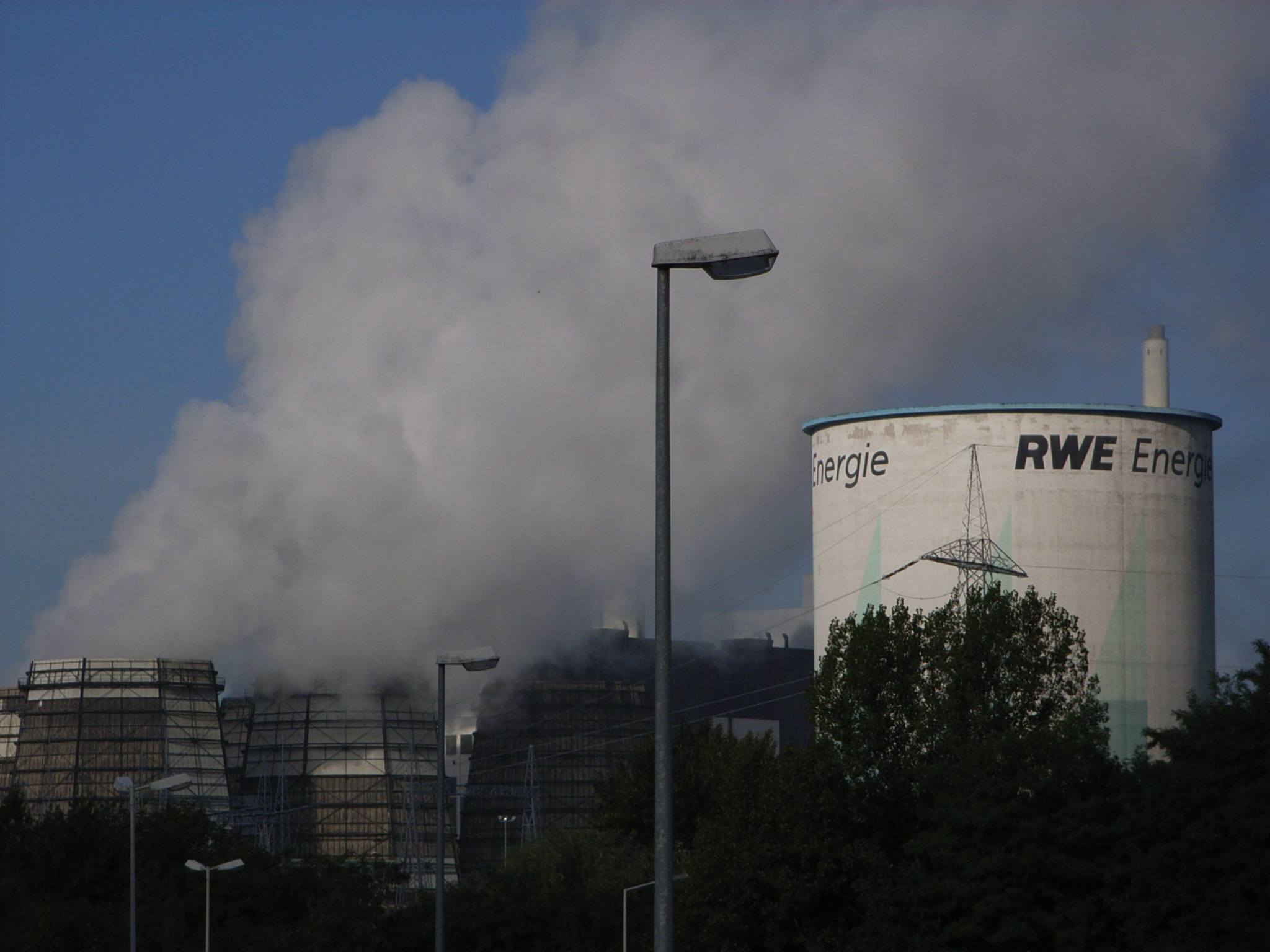 Kühltürme des RWE-Kraftwerks Goldenberg, Hürth-Knapsack, Deutschland